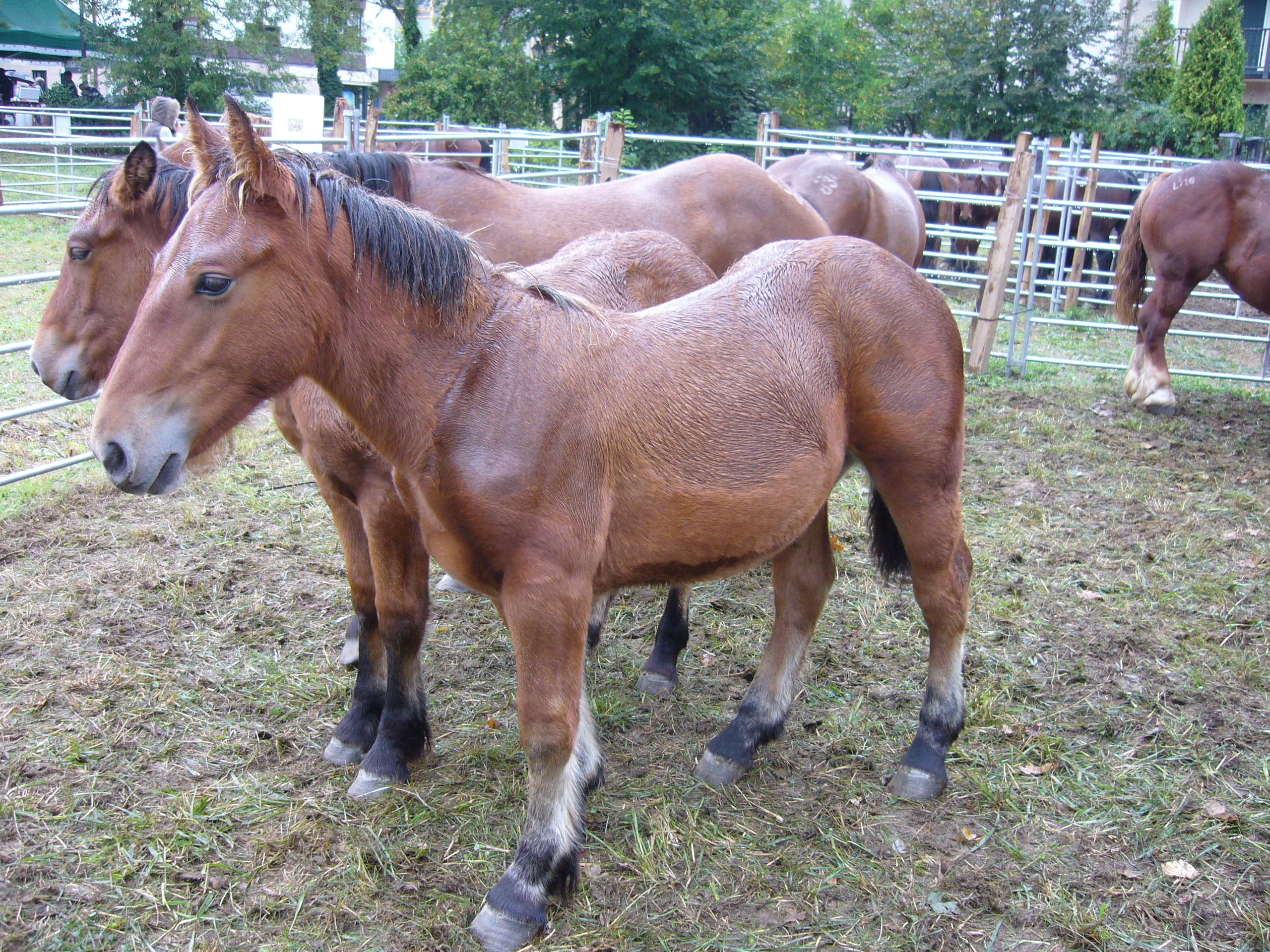 Nafar behokak Ormaiztegiko azokan.